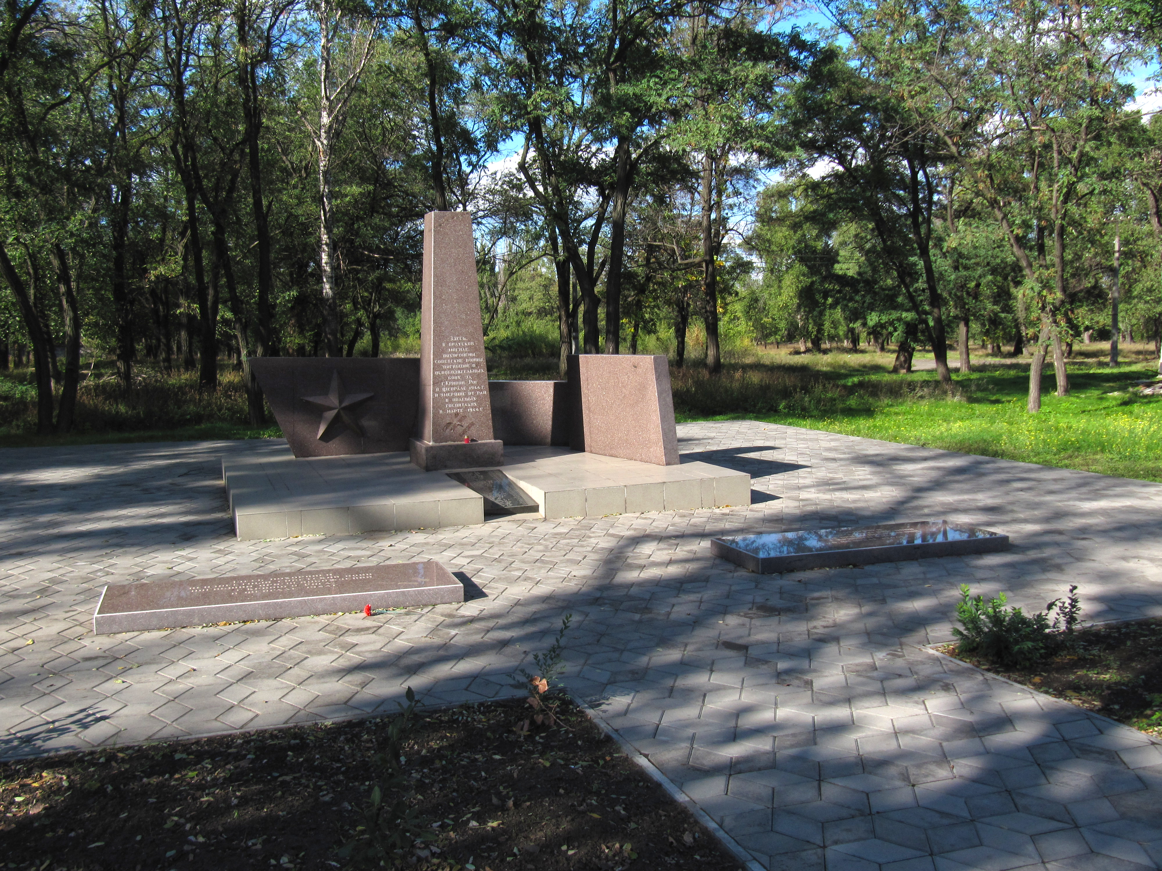 Група могил, в яких поховано 45 воїнів, що загинули у лютому 1944 р. при звільненні міста, а також у березні від ран у лазаретах. (одна братська та 2 індивідуальні могили)